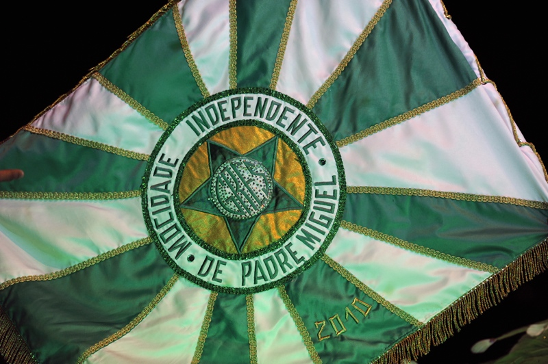 Festa de lançamento do CD do Grupo Especial 2011. Foto: Ricardo Almeida.